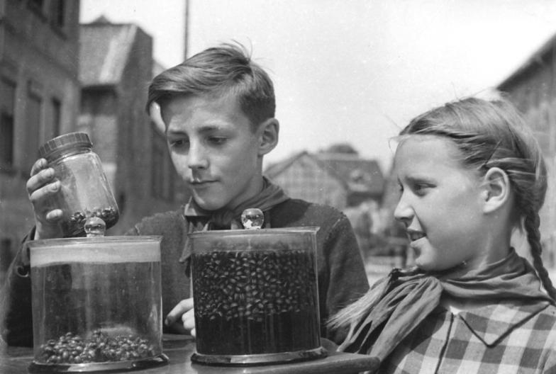 Vahldorf, Gesammelte Kartoffelkäfer Zentralbild Biscan 10.6.1952 Junge Pioniere helfen den Bauern. Die Jungen Pioniere der Pionierfreundschaft "Walter Ulbricht" in Vahldorf Kreis Haldensleben haben sich die Aufgabe gestellt, den Kartoffelkäfer, der unsere Ernteerträge bedroht, mit allen Mitteln zu bekämpfen. Die Jungen Pioniere helfen so mit, Verluste zu verhüten und eine hohe Ernte sicherzustellen. Allein der Junge Pionier Bodo Adamek hat schon rund 2000 Kartoffelkäfer abgeliefert. UBz: Zwei der erfolgreichsten Sammler:- Die Jungen Pioniere Bodo Adamek und Magdalena Arndt, beide Schüler der 6. Klasse. Bodo hat schon 2000 Käfer abgeliefert, allein 1364 an einem Tag, Magdalena schon 800 Stück. In dem Glas vorn rechts befinden sich rund 5000 Kartoffelkäfer.